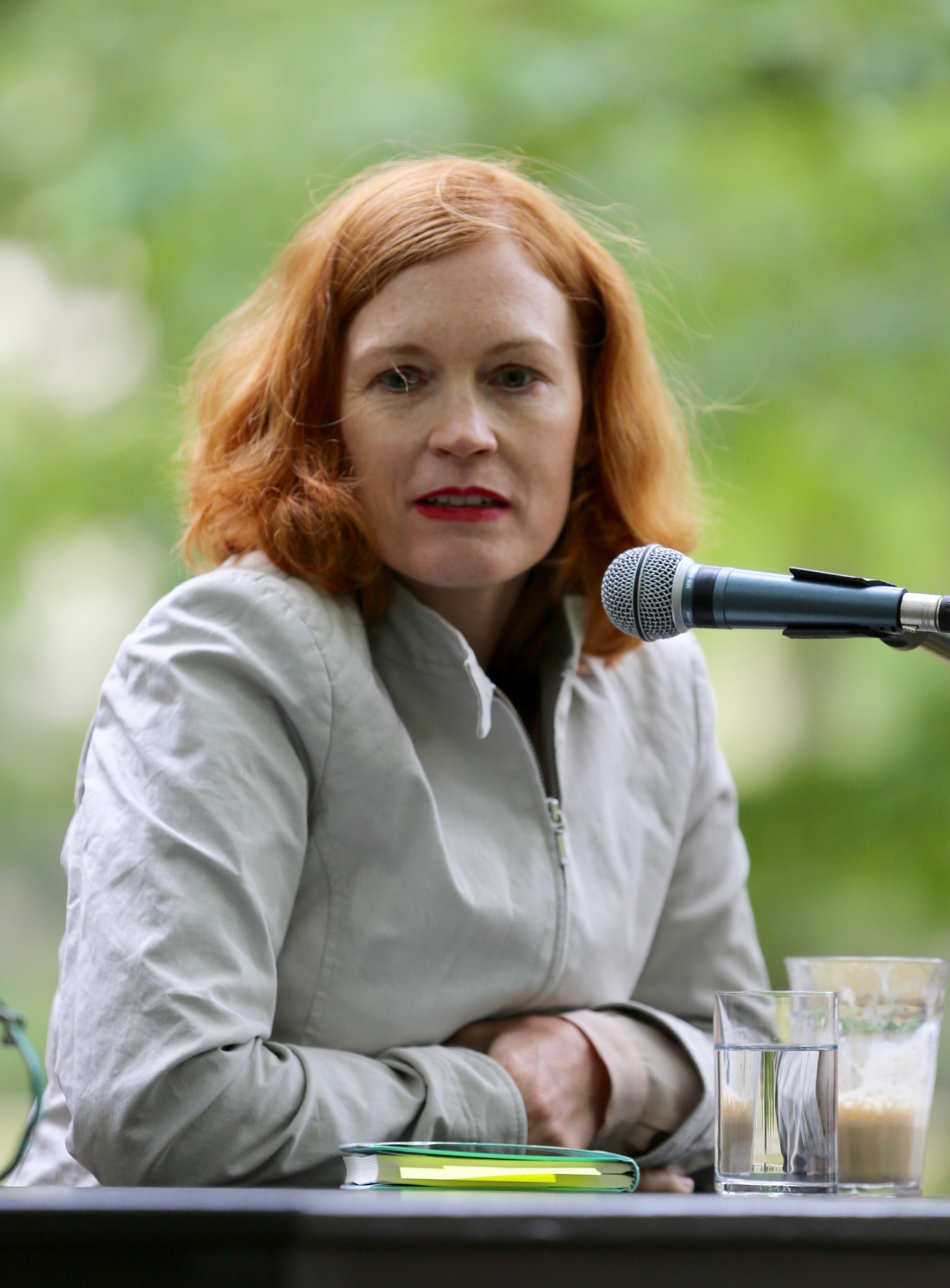 Maike Wetzel beim Erlanger Poetenfest 2018. Sie stellt ihren Roman "Elly" vor.